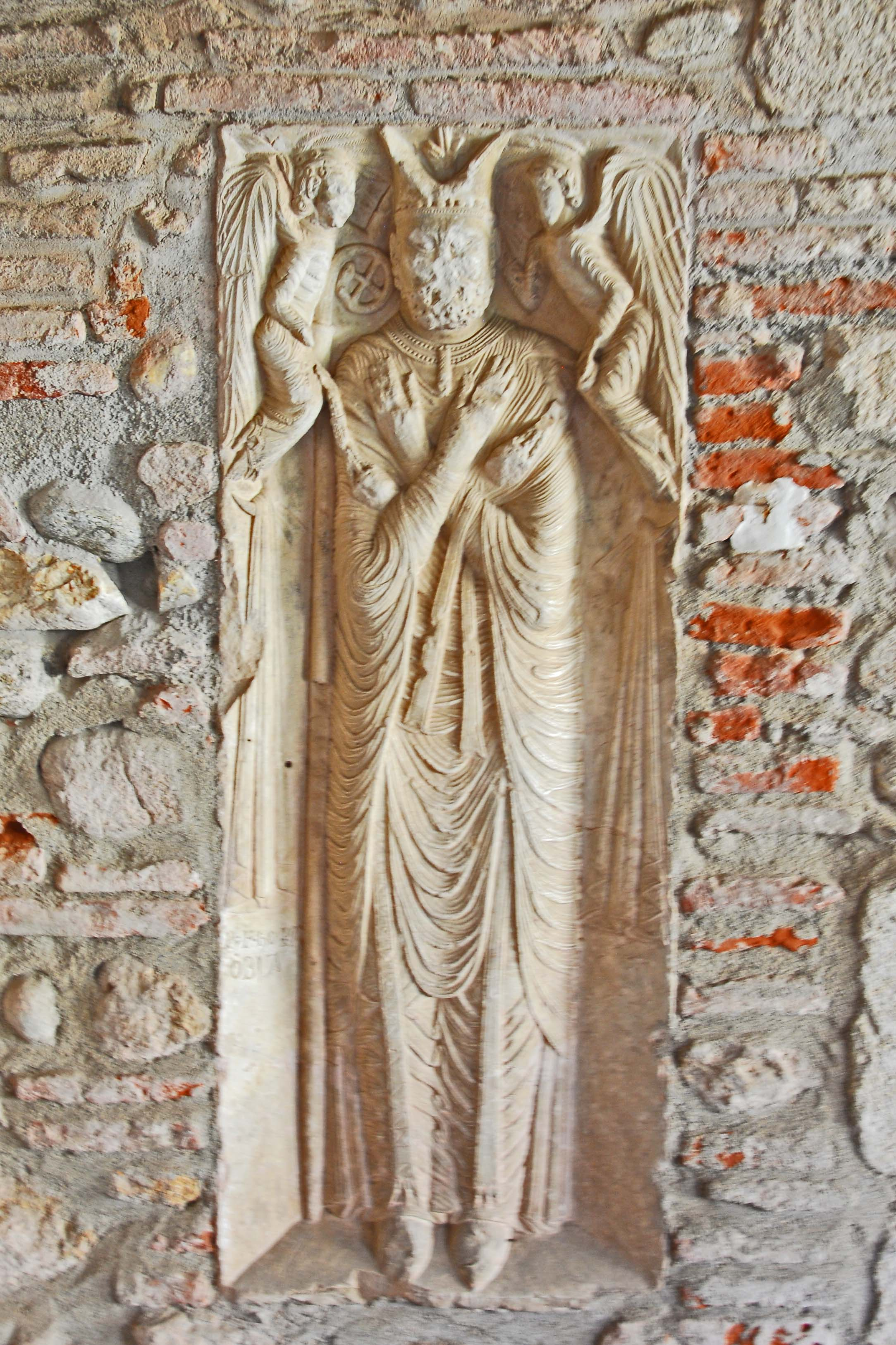 Ste-Eulalie-et-Ste-Julie_d’Elne, Grabplatte in Süsgalerie, Bischof